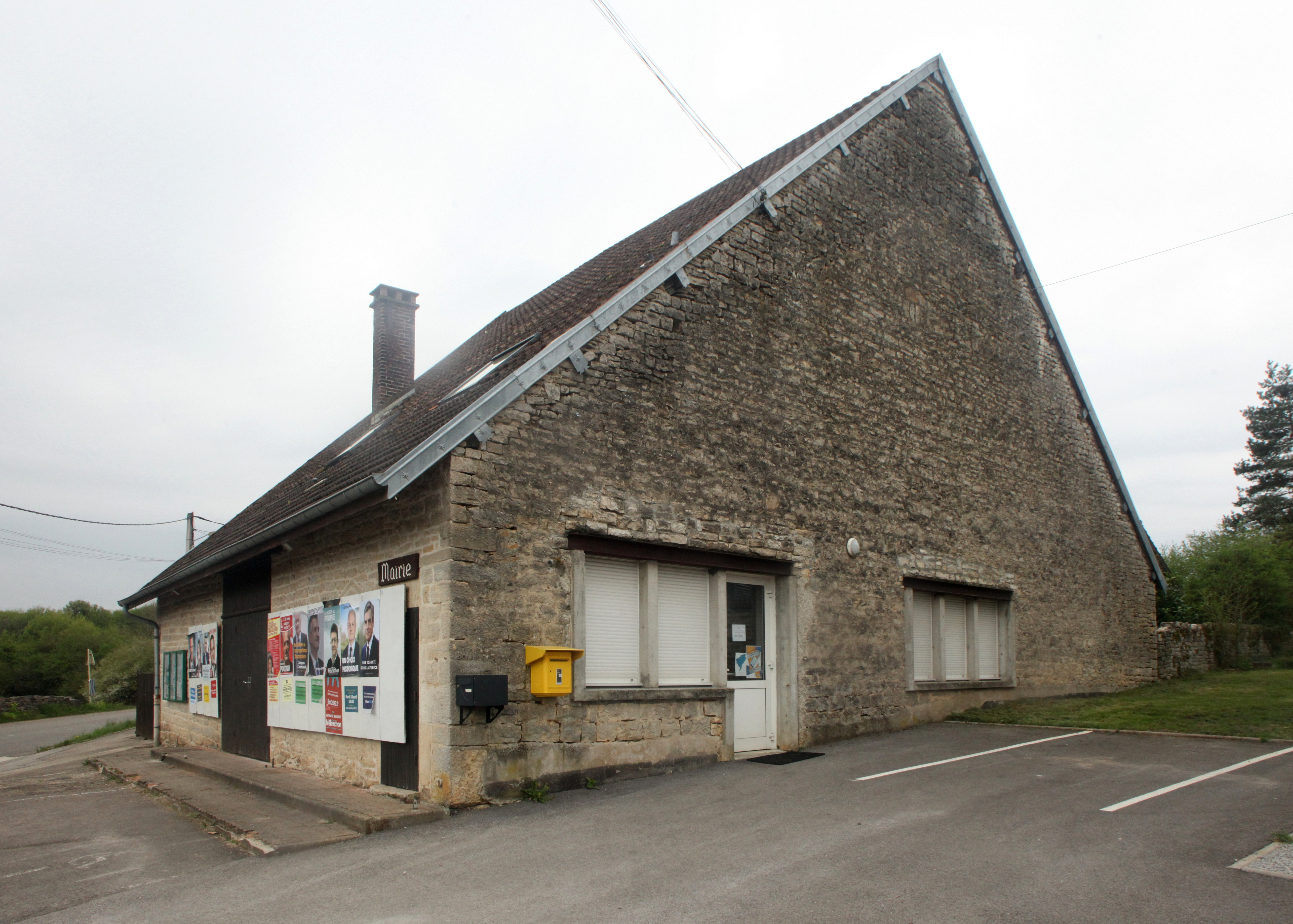 Mairie de Charnay (Doubs).